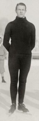 Vier van Nederlands beste schaatsenrijders die in Davos de eer van de Nederlandse vlag hooghouden. Vlnr; Dolf van der Scheer uit Zutphen, Teun Hoofdman, Willem Kos uit Oudkarspel, en Simon Heijden uit IJsselmonde, Davos, Zwitserland 1929.